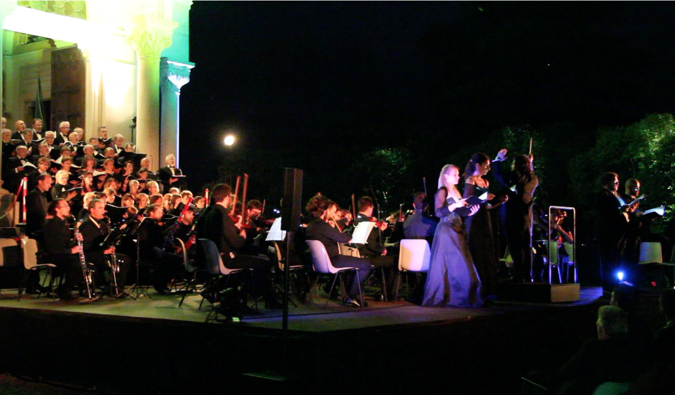 L'image est tirée d'une vidéo prise par moi personnellement lors de l'exécution du Requiem de Mozart au pied du Tombeau de Custoza le 25 juin 2016